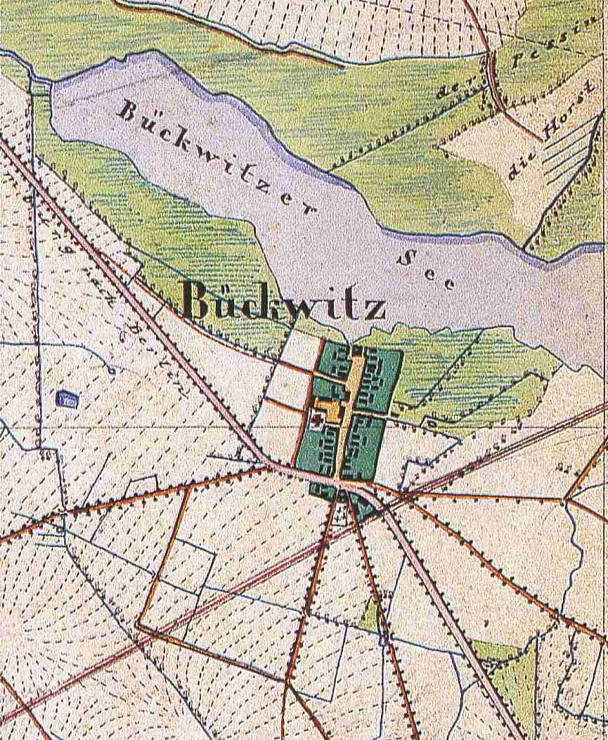 Bückwitz, Ortsteil der Stadt Wusterhausen/Dosse, Landkreis Ostprignitz-Ruppin, Brandenburg, Ausschnitt aus dem Urmesstischblatt 3140 Neustadt (Dosse) von 1841